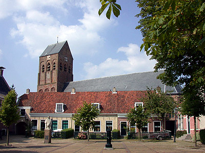 Ferwert, tsjerke